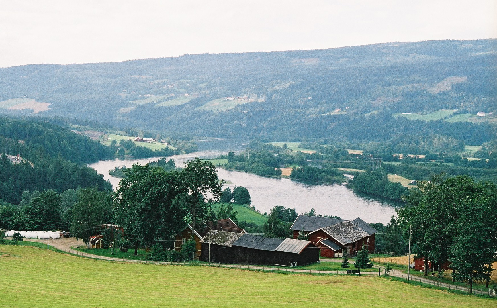 Part of Lågendeltaet nature reserve, Lillehammer, Norway.